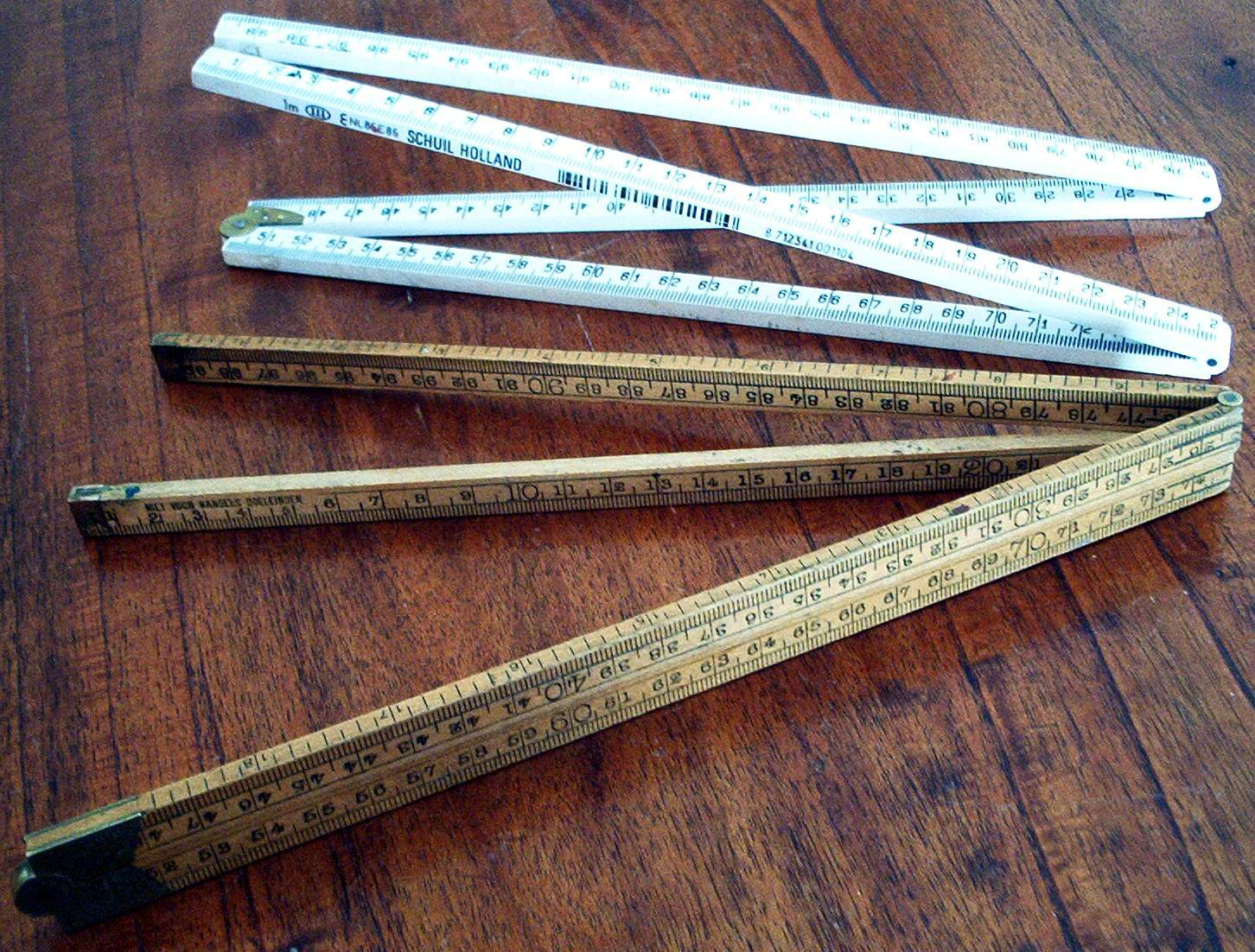 zelf gemaakte foto voor het publiek domein. Martink.